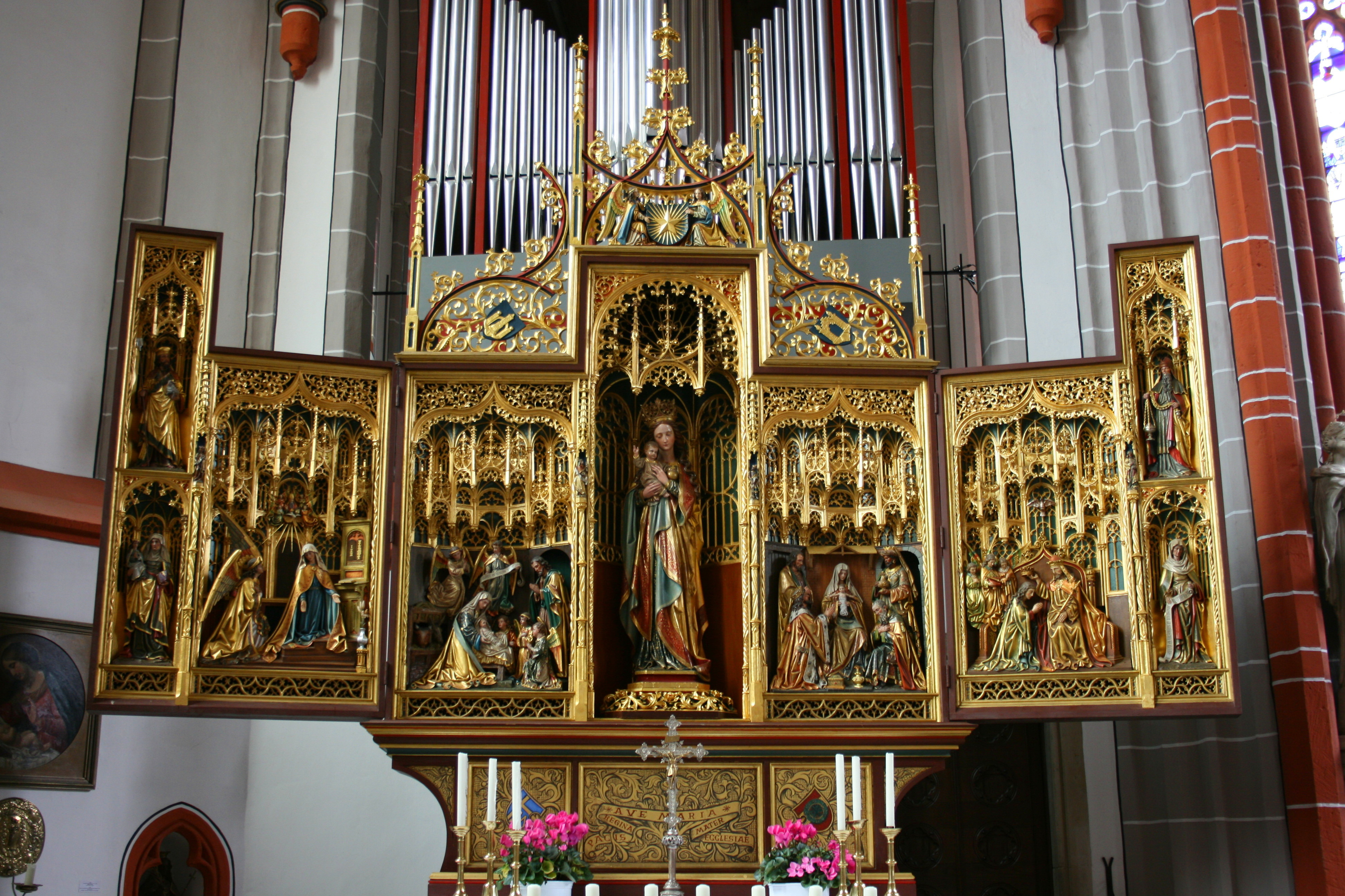 Sankt Peter und Paul in Kranenburg